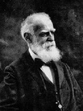 Luigi Pigorini (1842-1925), archeologo e paletnologo italiano.